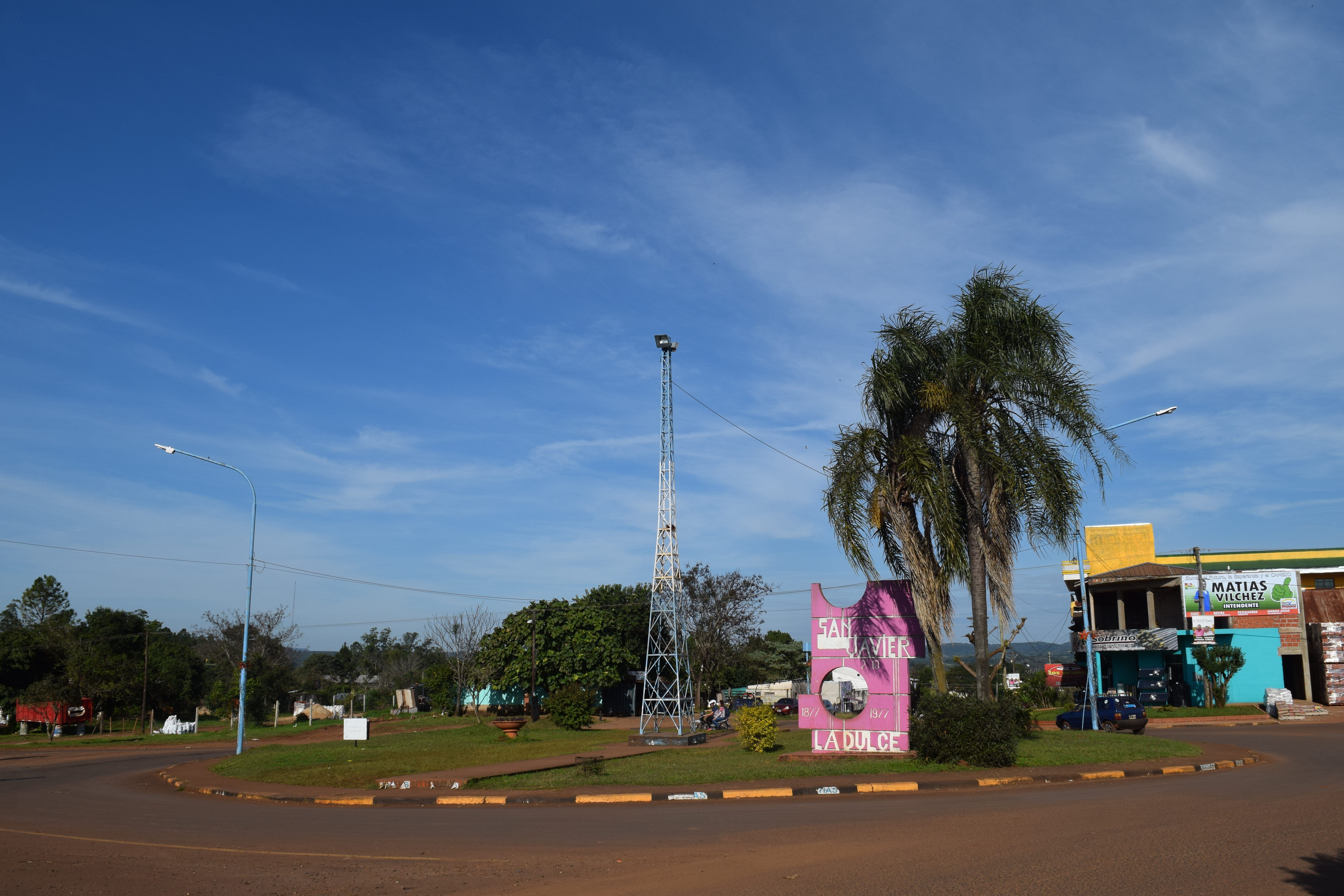 Rotonda de acceso a la localidad de San Javier (Misiones) sobre la Ruta Provincial 4.